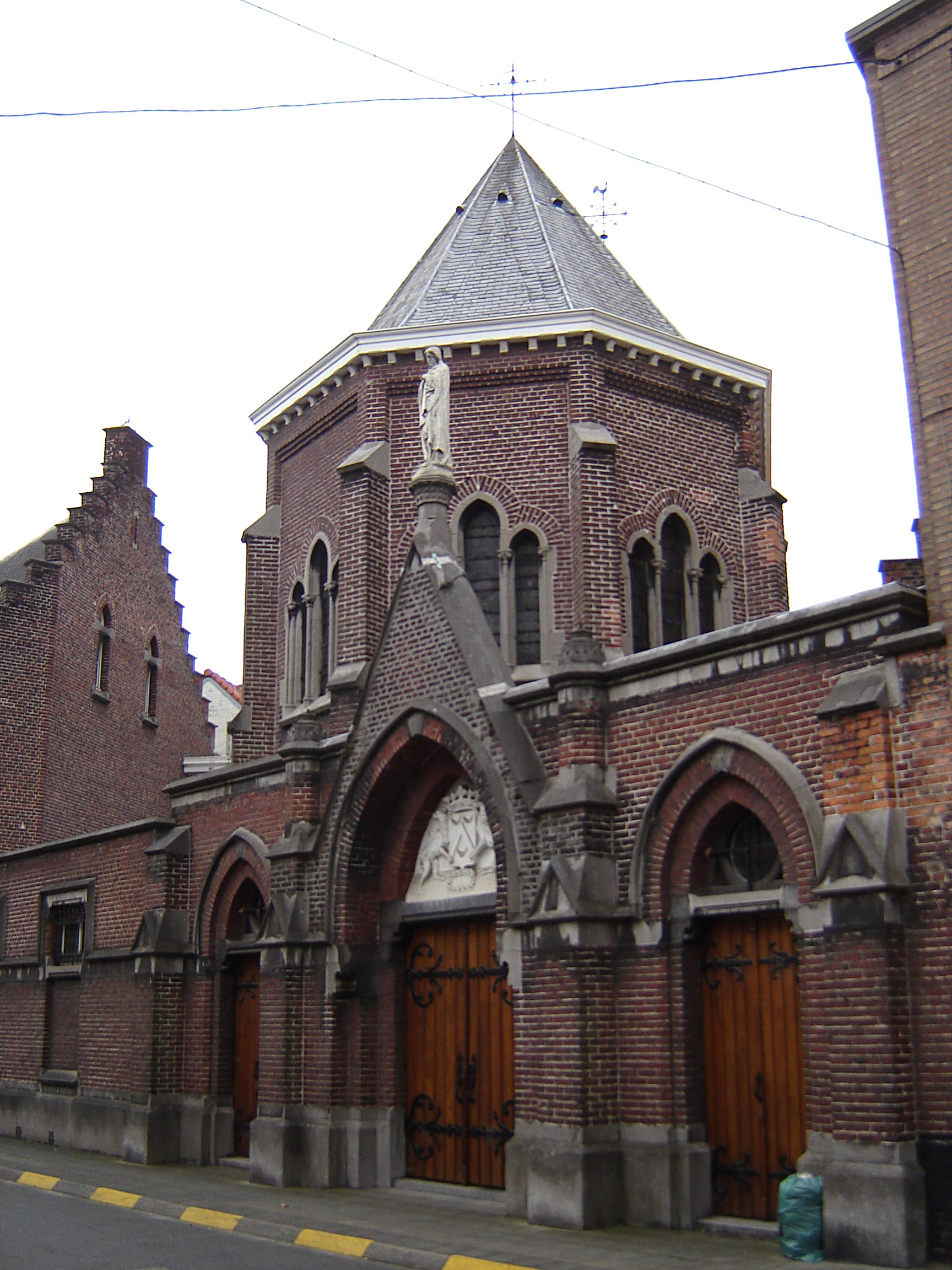 Klooster Onze-Lieve-Vrouw van Vrede - Zuster Benedictinessen in Menen. "Klooster Onze-Lieve-Vrouw van Vrede" (Our Lady of Peace convent) - Benedictine nurses, in Menen. Menen, West Flanders, Belgium